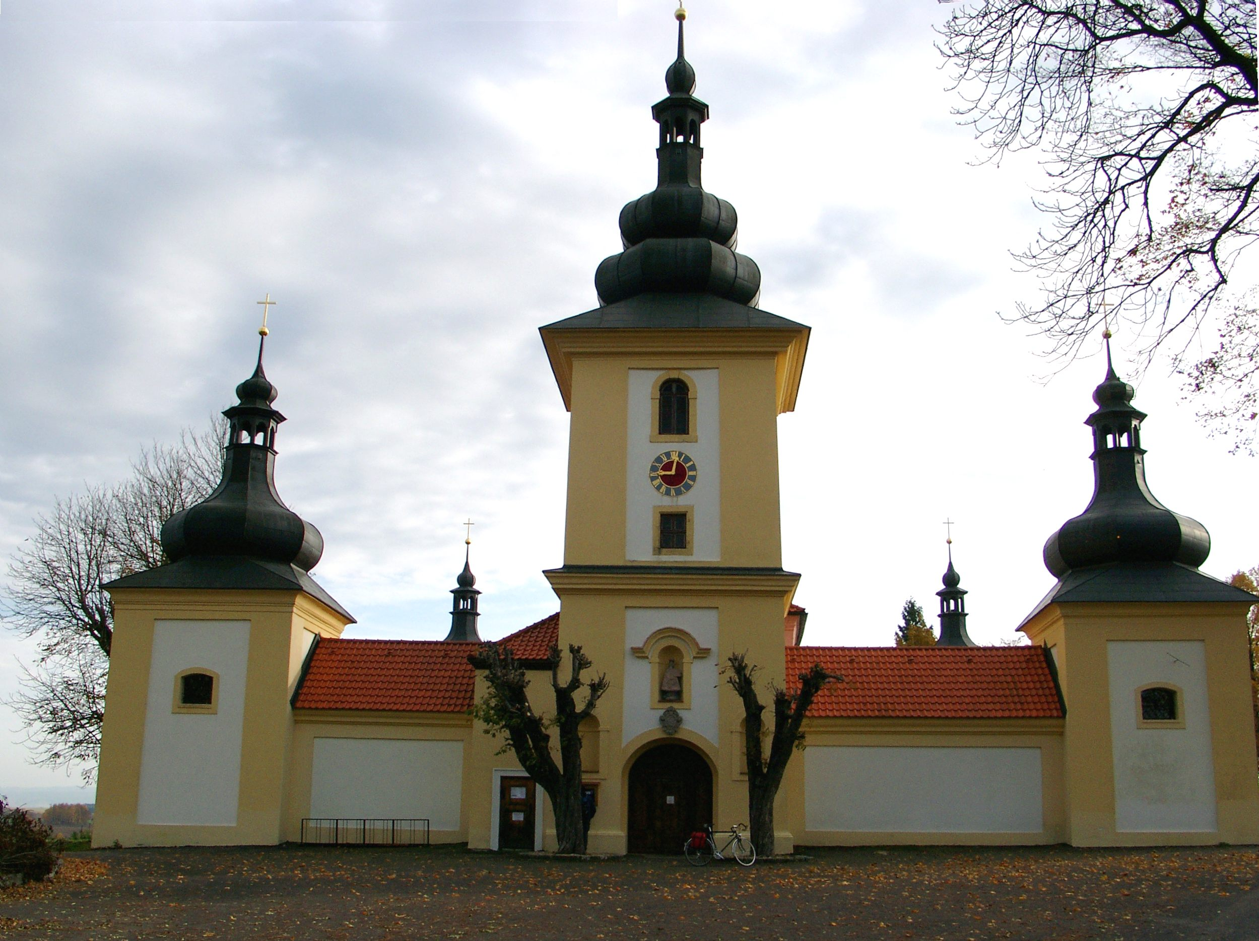 Kirche Maria Loreto in Altkinsberg